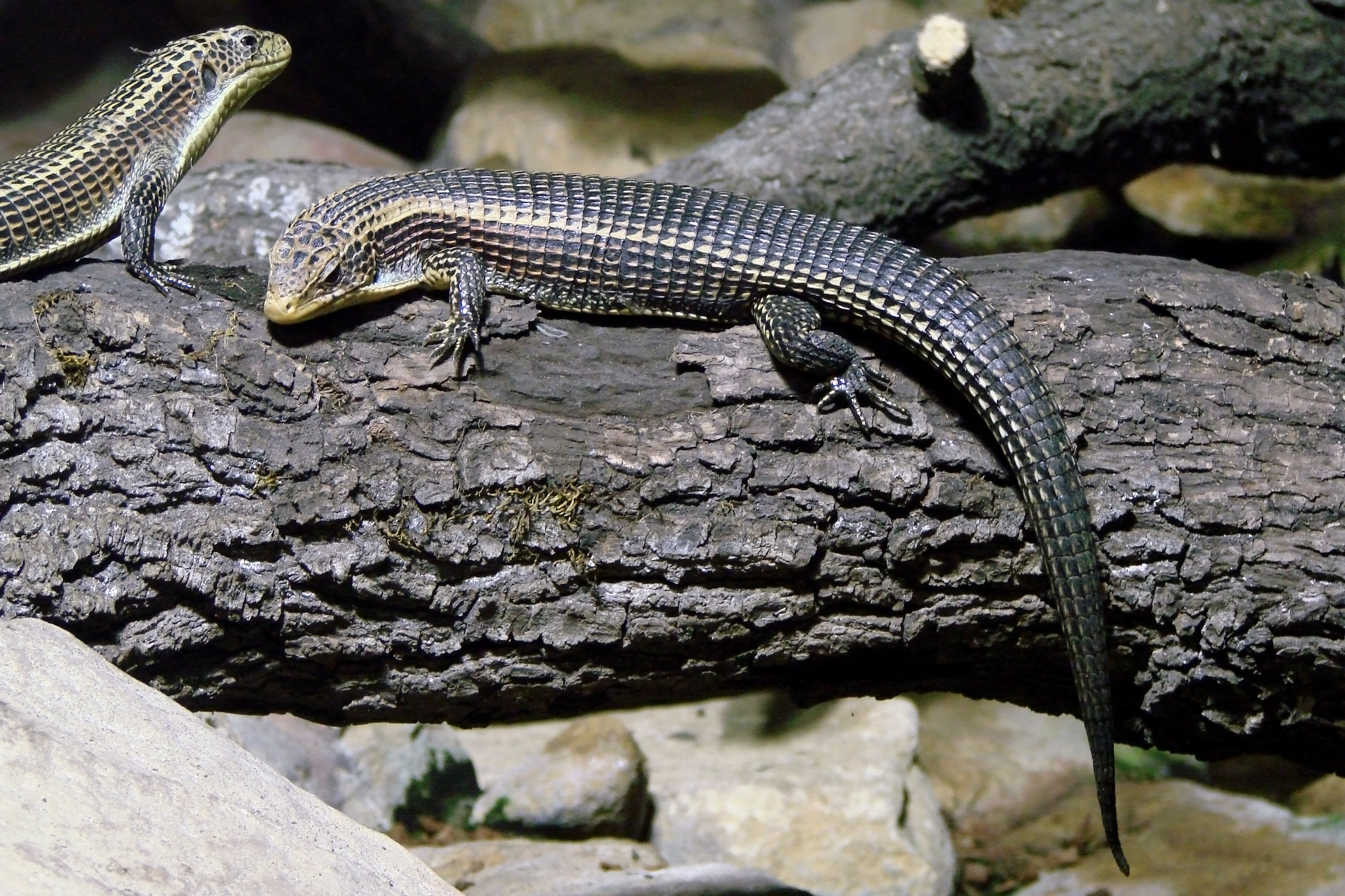 Lézards plaqués (Gerrhosaurus major), zoo d'Amnéville.